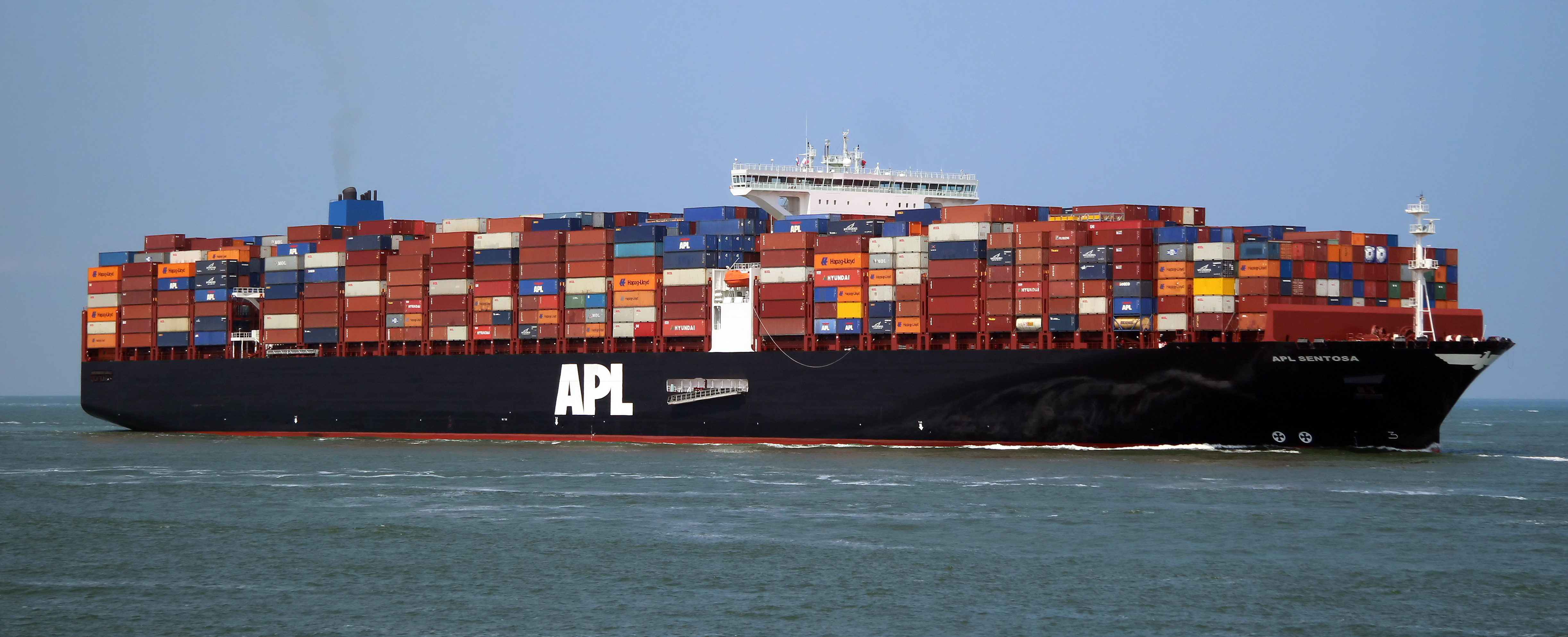 APL Sentosa in Hook of Holland